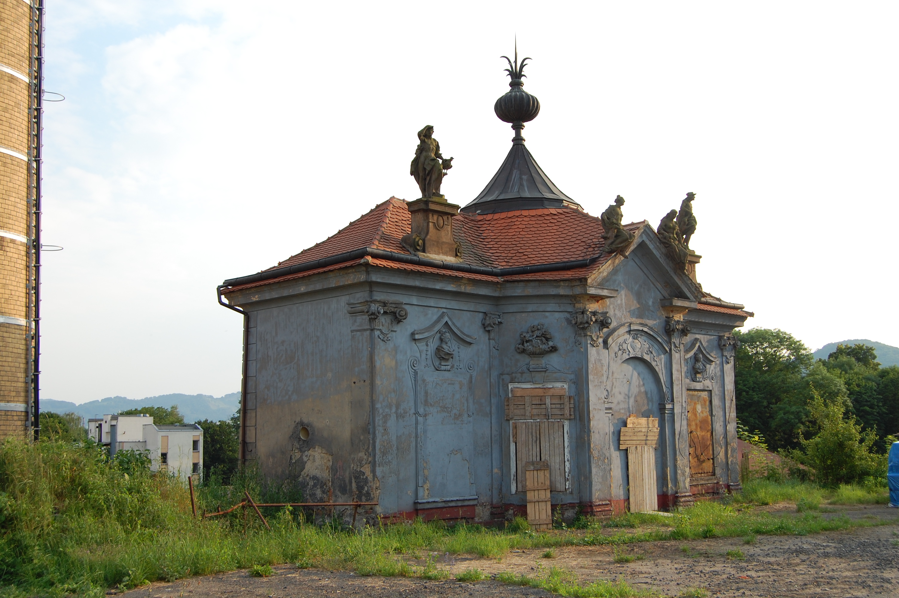 Čajový (Čínský) pavilon děčínského zámku.